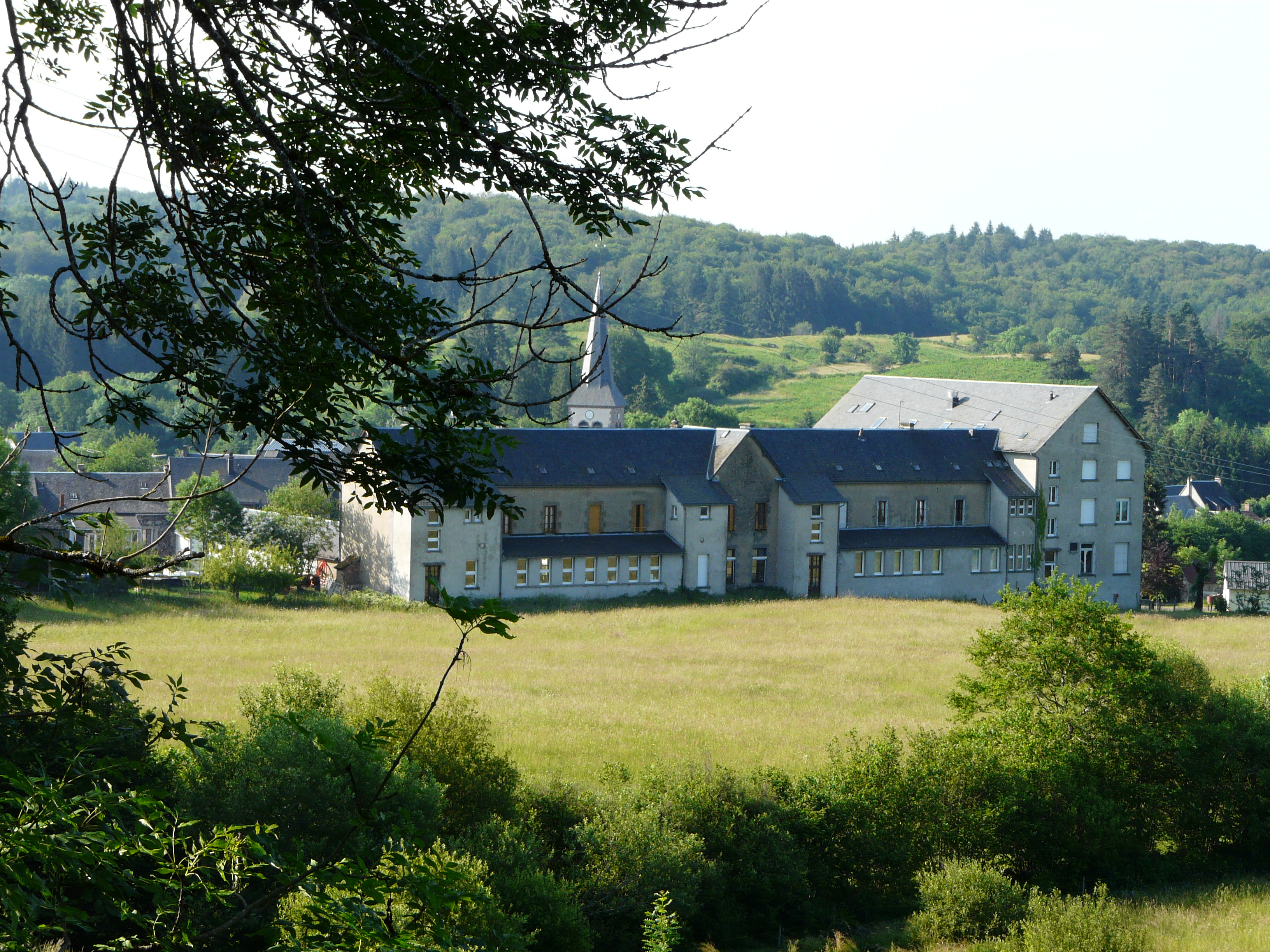 Le village de Bagnols, Puy-de-Dôme, France.